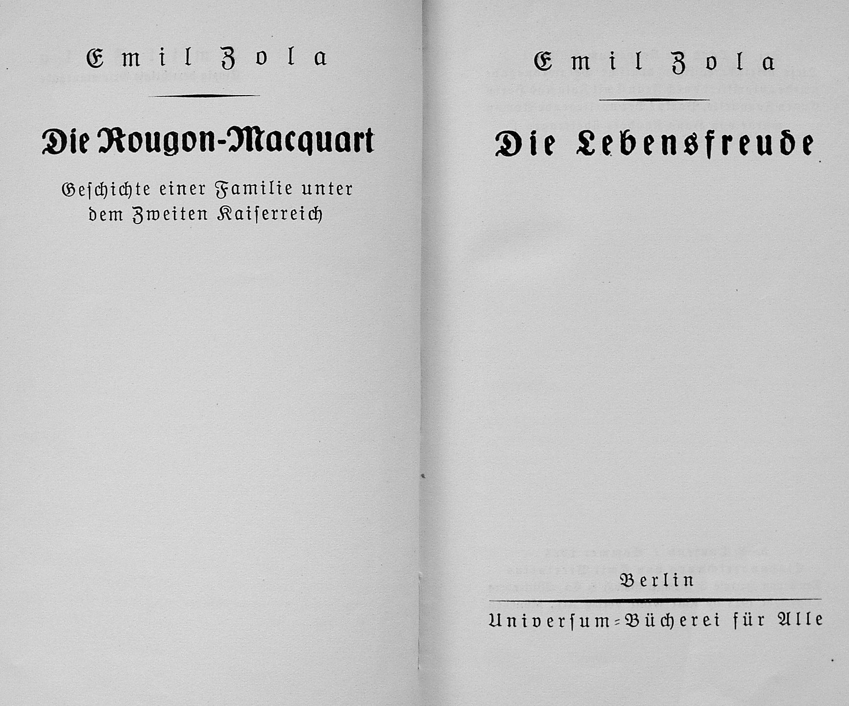 Buch Die Lebensfreude Zola